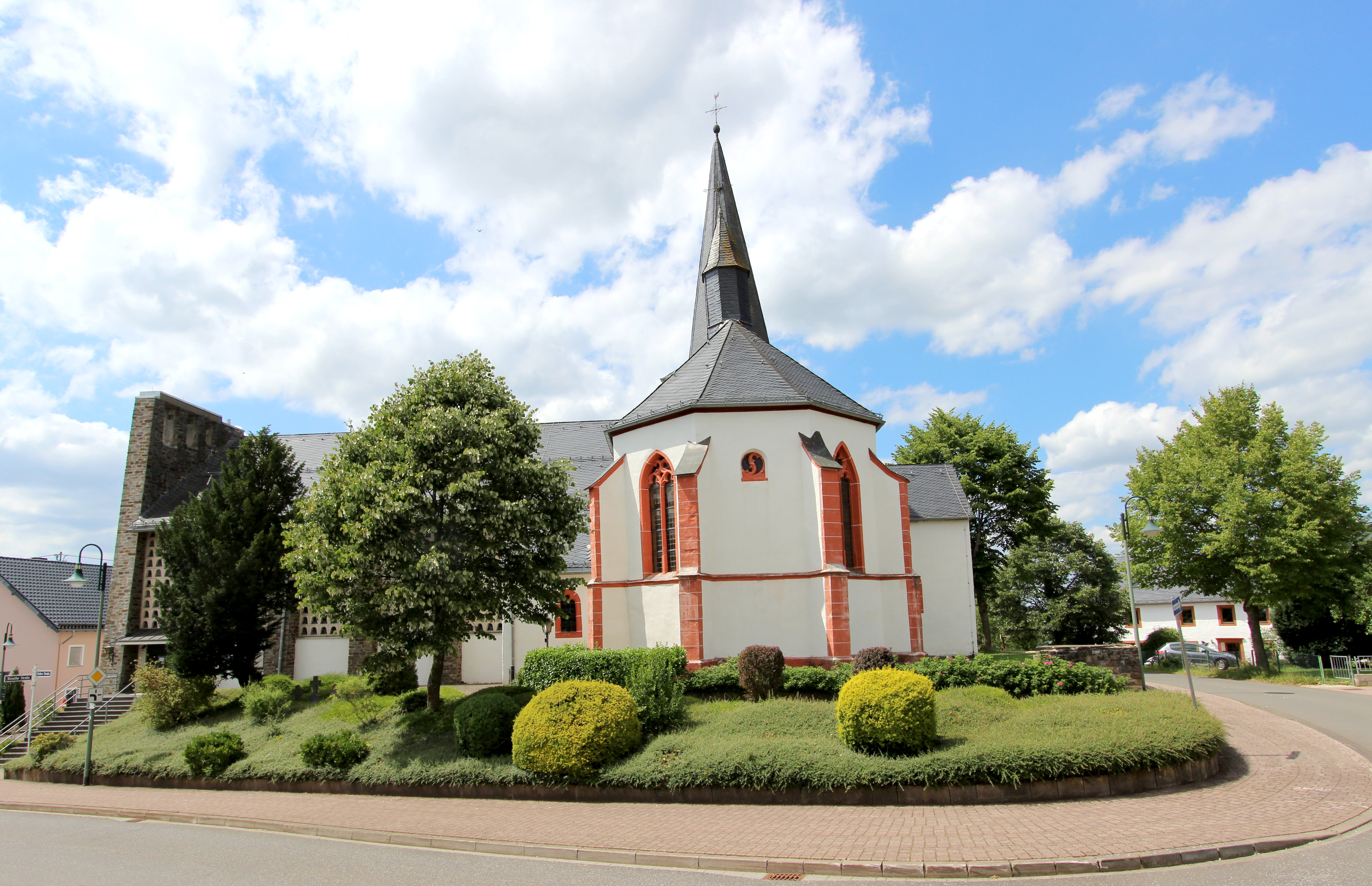 54597 Auw bei Prüm, Rother Straße 1. Spätgotischer Saalbau, massiger Westturm, im Wesentlichen um 1511/31, eventuell mit älteren Teilen, Kapellenanbauten angeblich von 1652; mit Ausstattung; Pfarrergrabplatte, um 1775. Aufnahme von 2017.